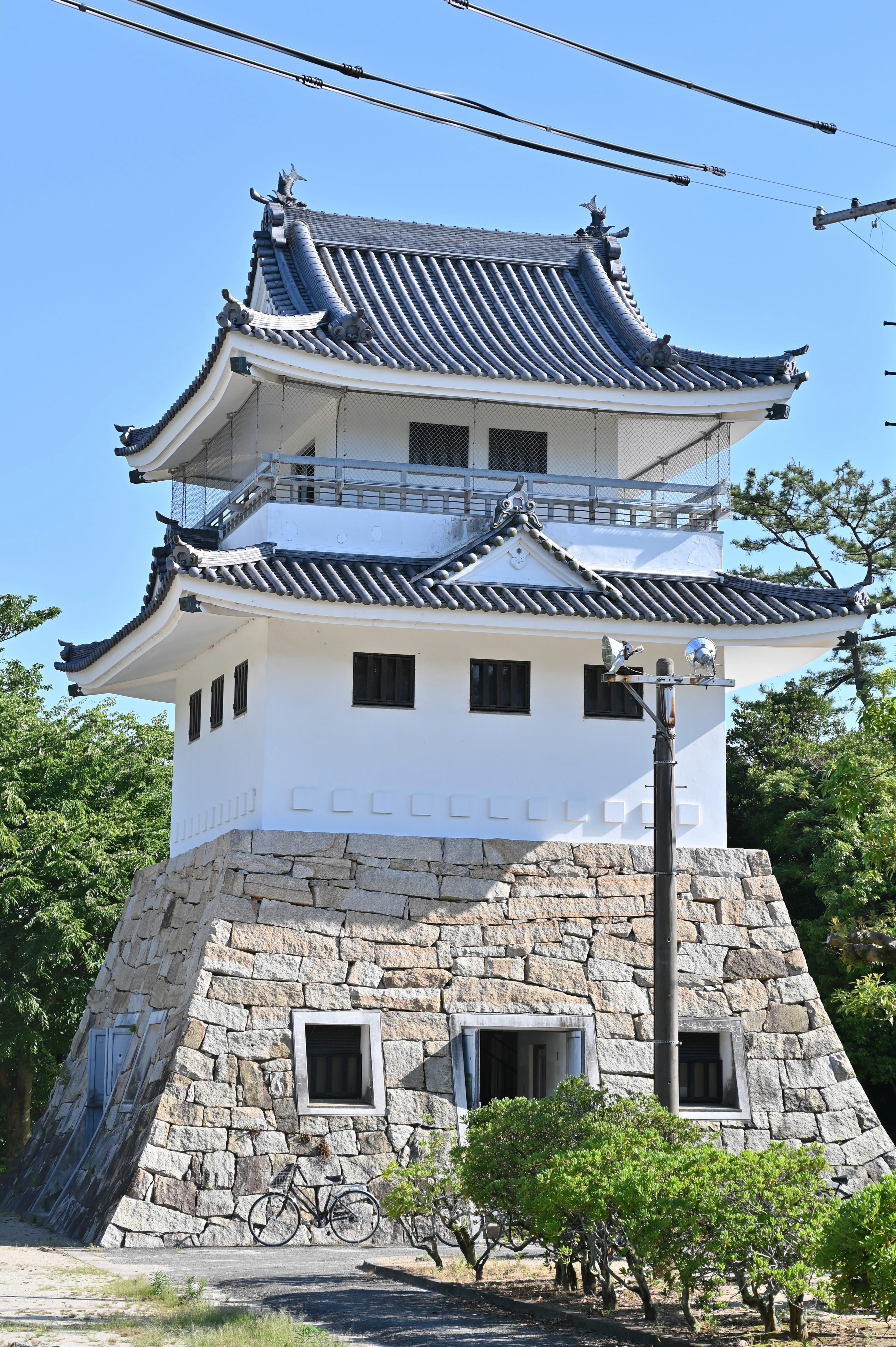 大草城模擬天守 Nikon Z 6